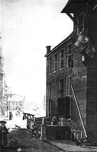 Zijingang van Herberg Het Gouden Hoofd te Groningen